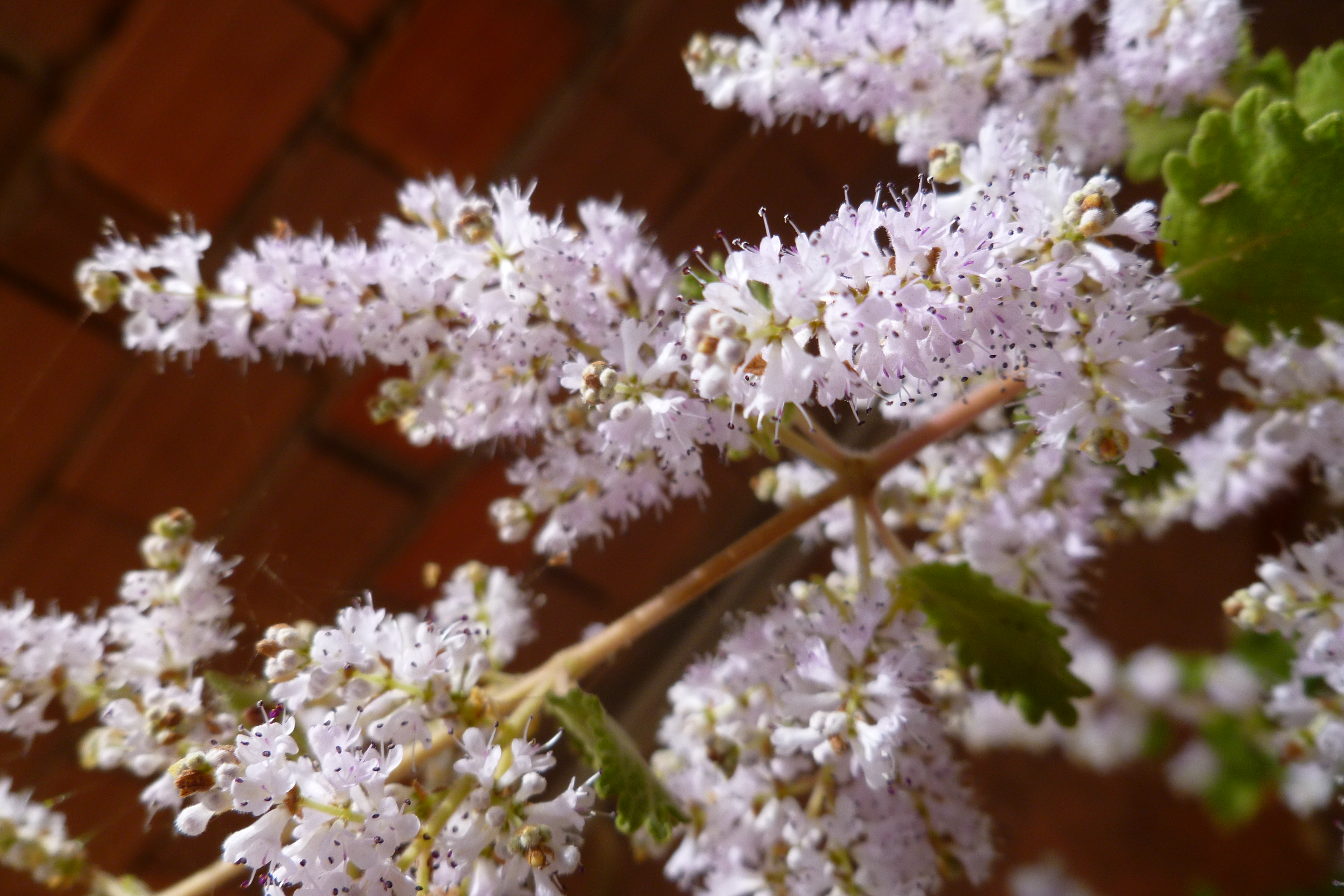 Floro de Tetradenia riparia.